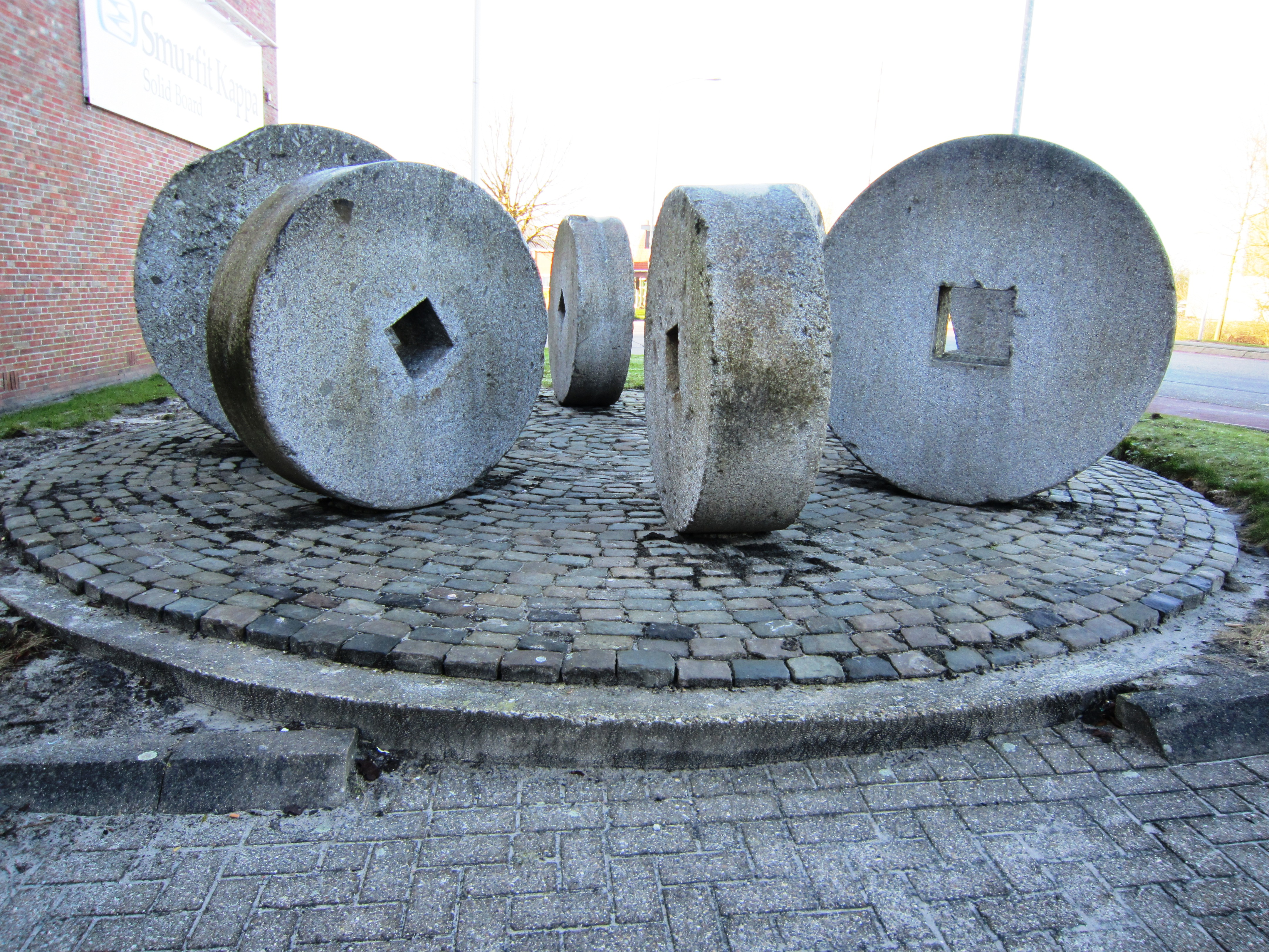 Bad Nieuweschans molenstenen